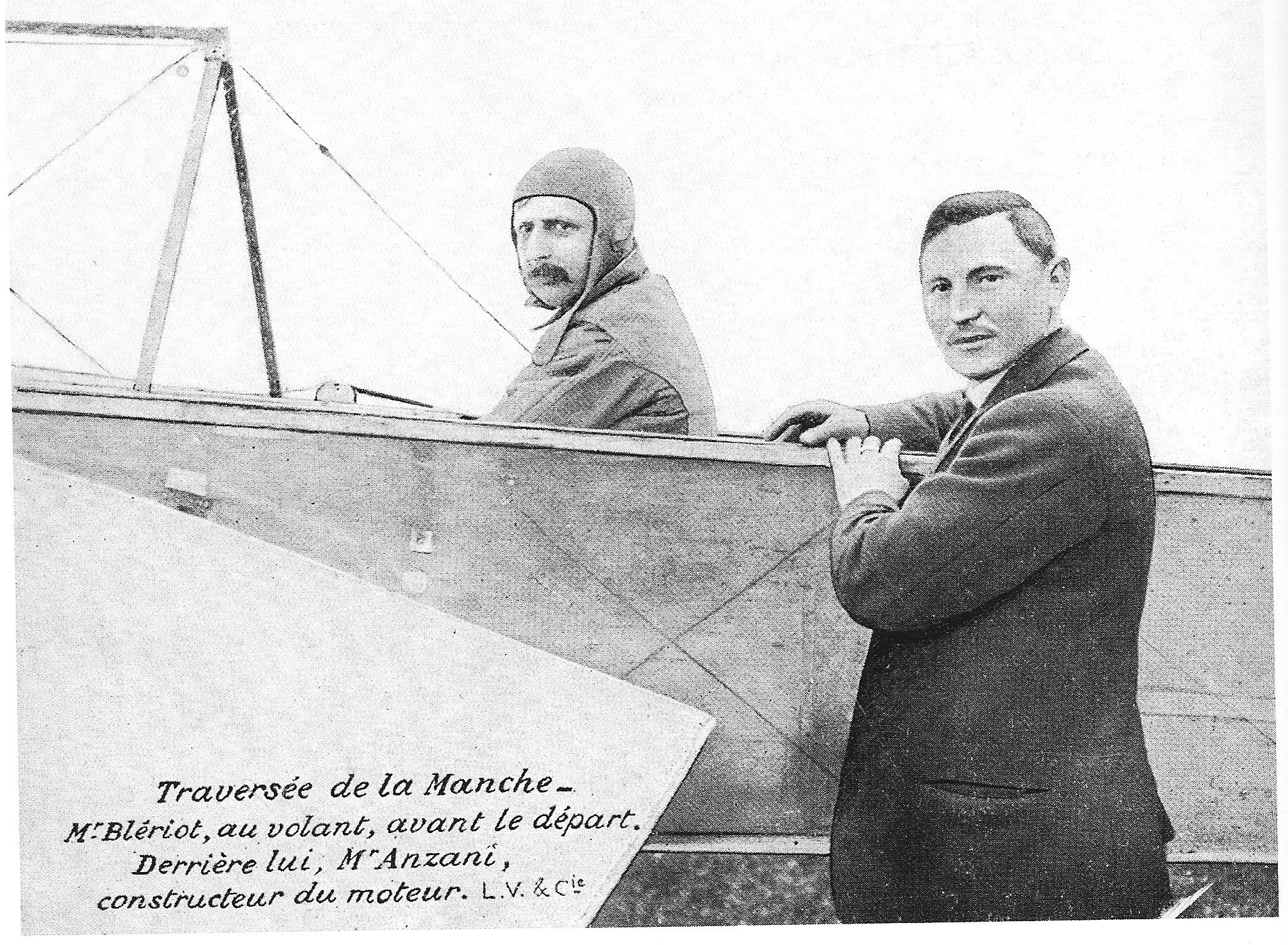 Blériot et Anzani avant la traversée de la Manche. Carte postale de 1909.